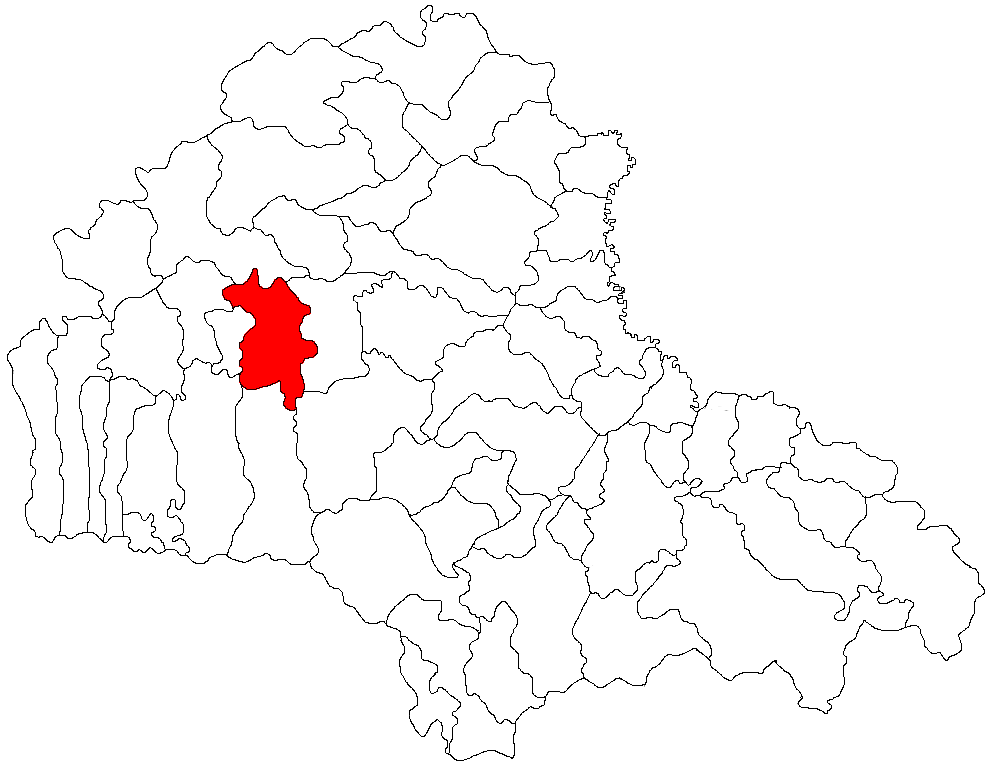 Categorie:Hărţi ale judeţului Braşov